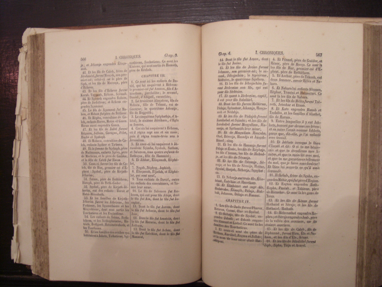 Die Bibel von Vincent van Gogh - aufgenommen in Cuesmes, Belgien